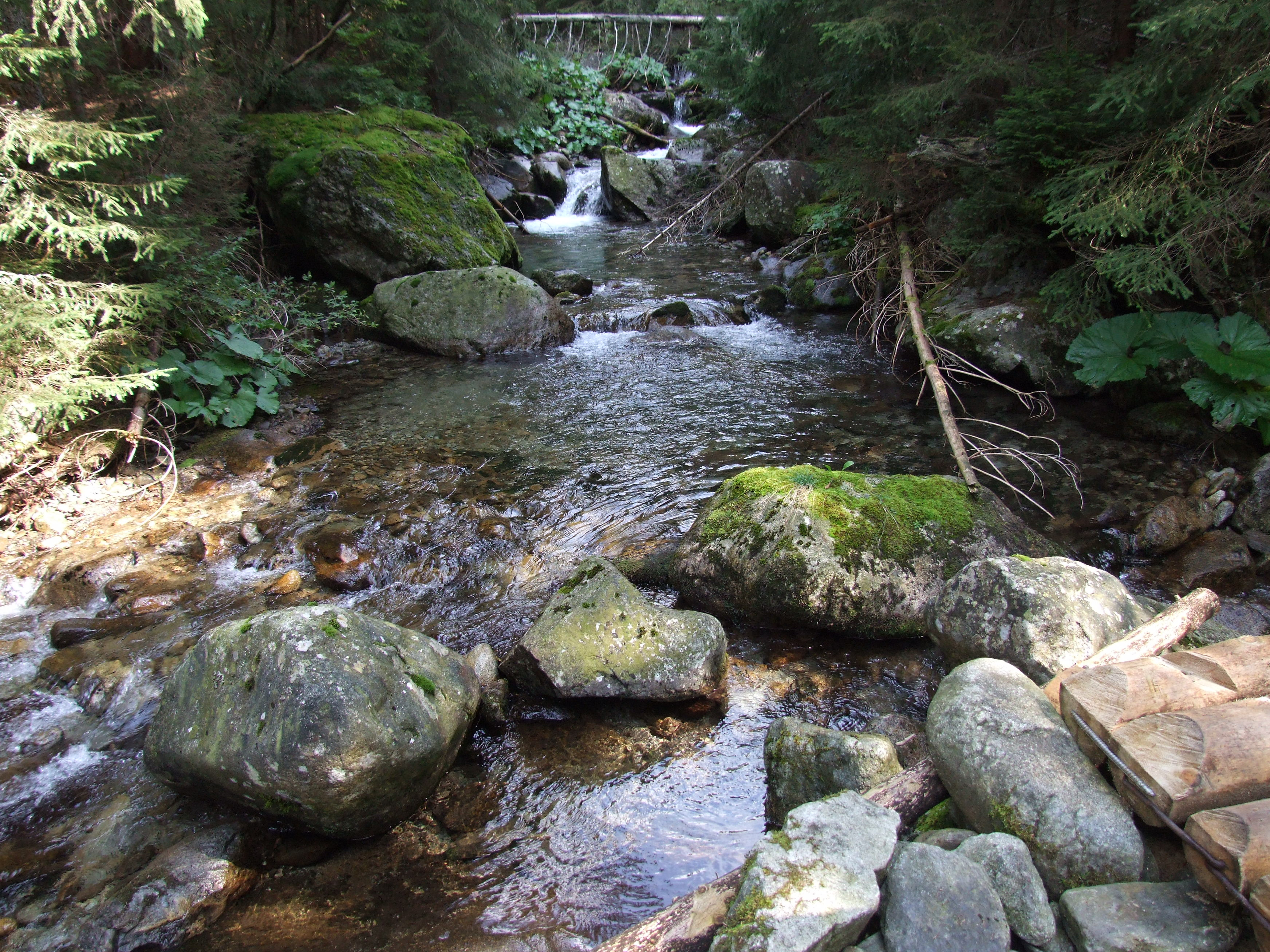 Potok Parzychwost przy rozdrożu pod Łyścem